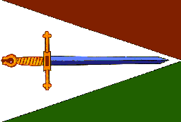 prapor obce Šanov